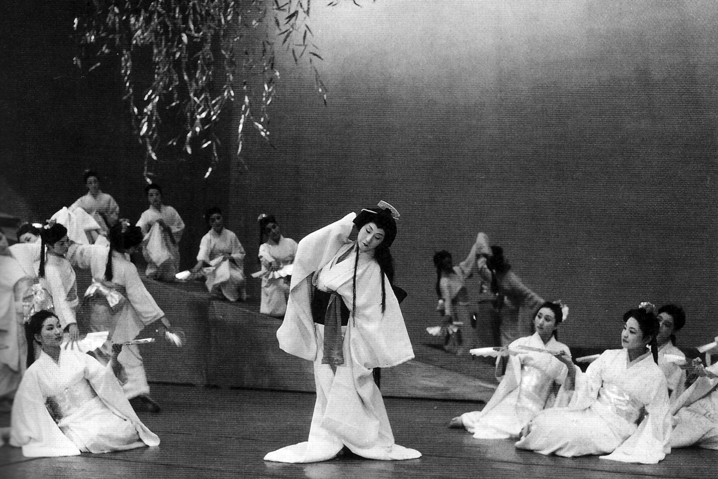 雪組「四つのファンタジア」。中央：天津乙女(Amatsu Otome)。